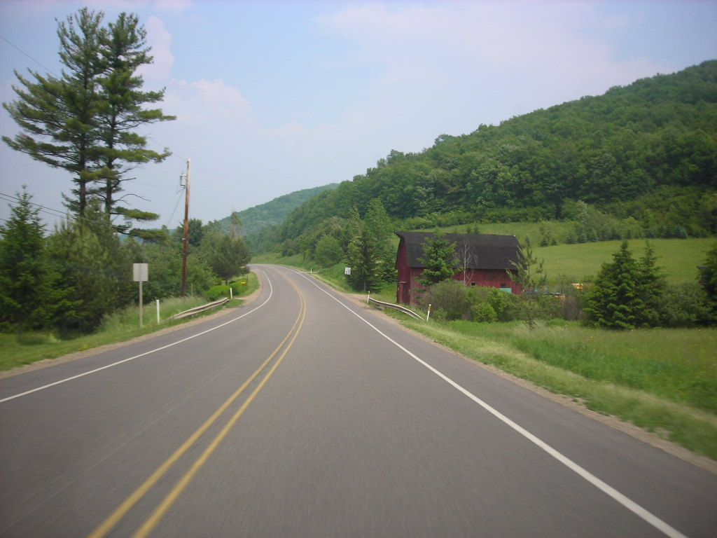 US Route 6 - Pennsylvania